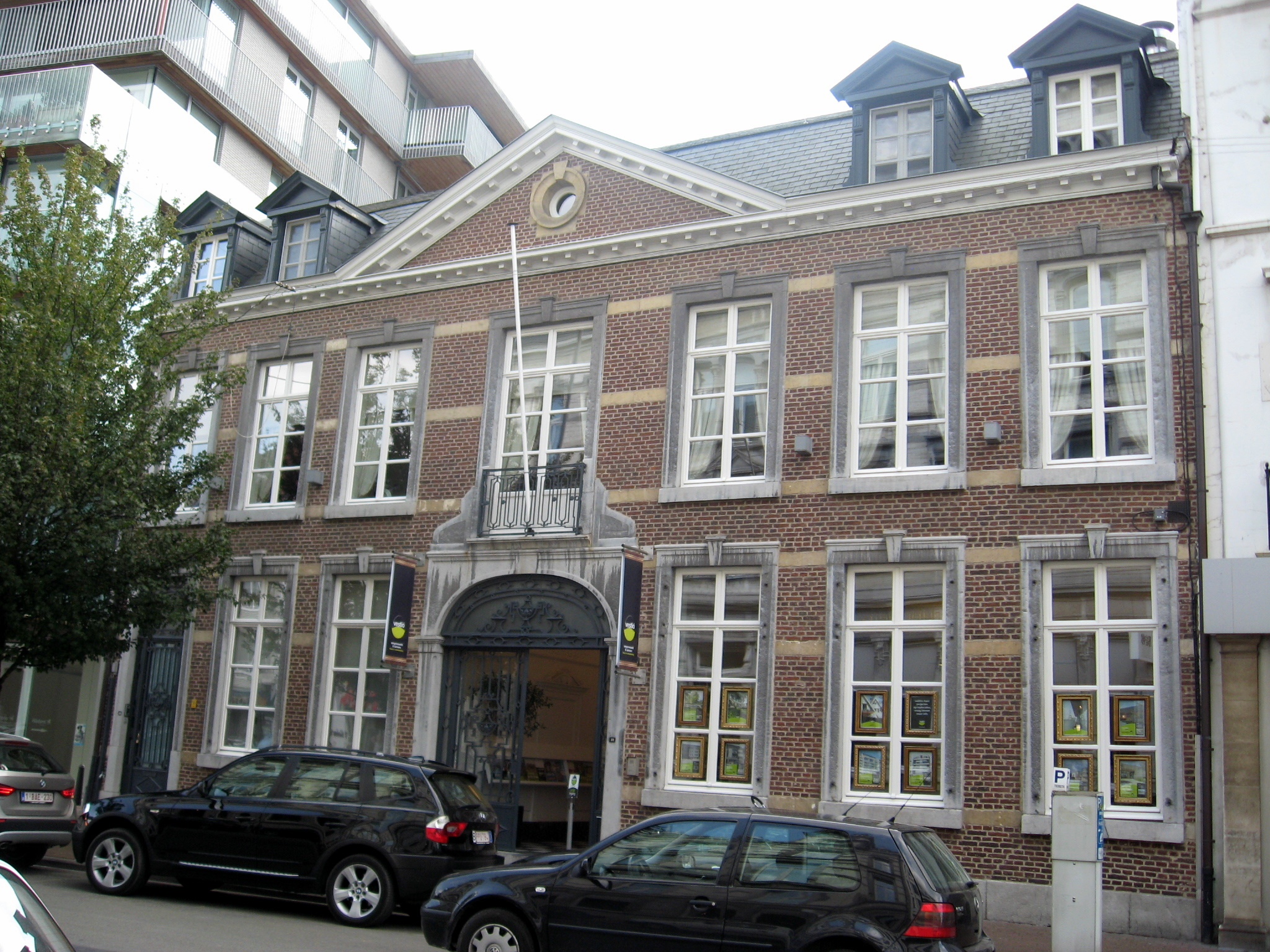 Herenhuis Den Cleynen Eenhoeren in Hasselt